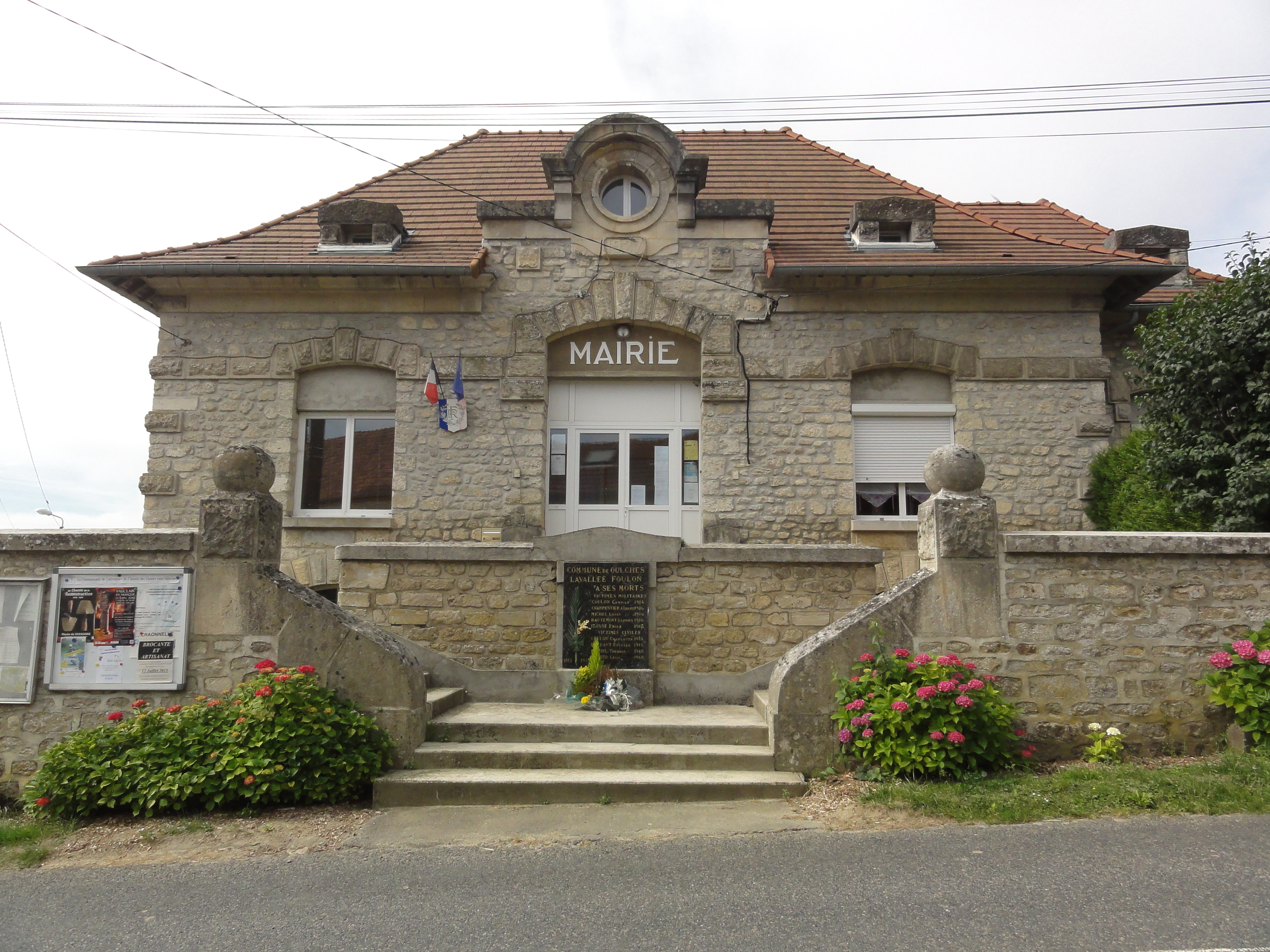 Oulches-la-Vallée-Foulon (Aisne) mairie